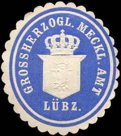 Sealing stamp Title: Grossherzoglich Mecklenburger Amt Lübz Description: blau, weiß, geprägt Place: Lübz size: 4x3 cm